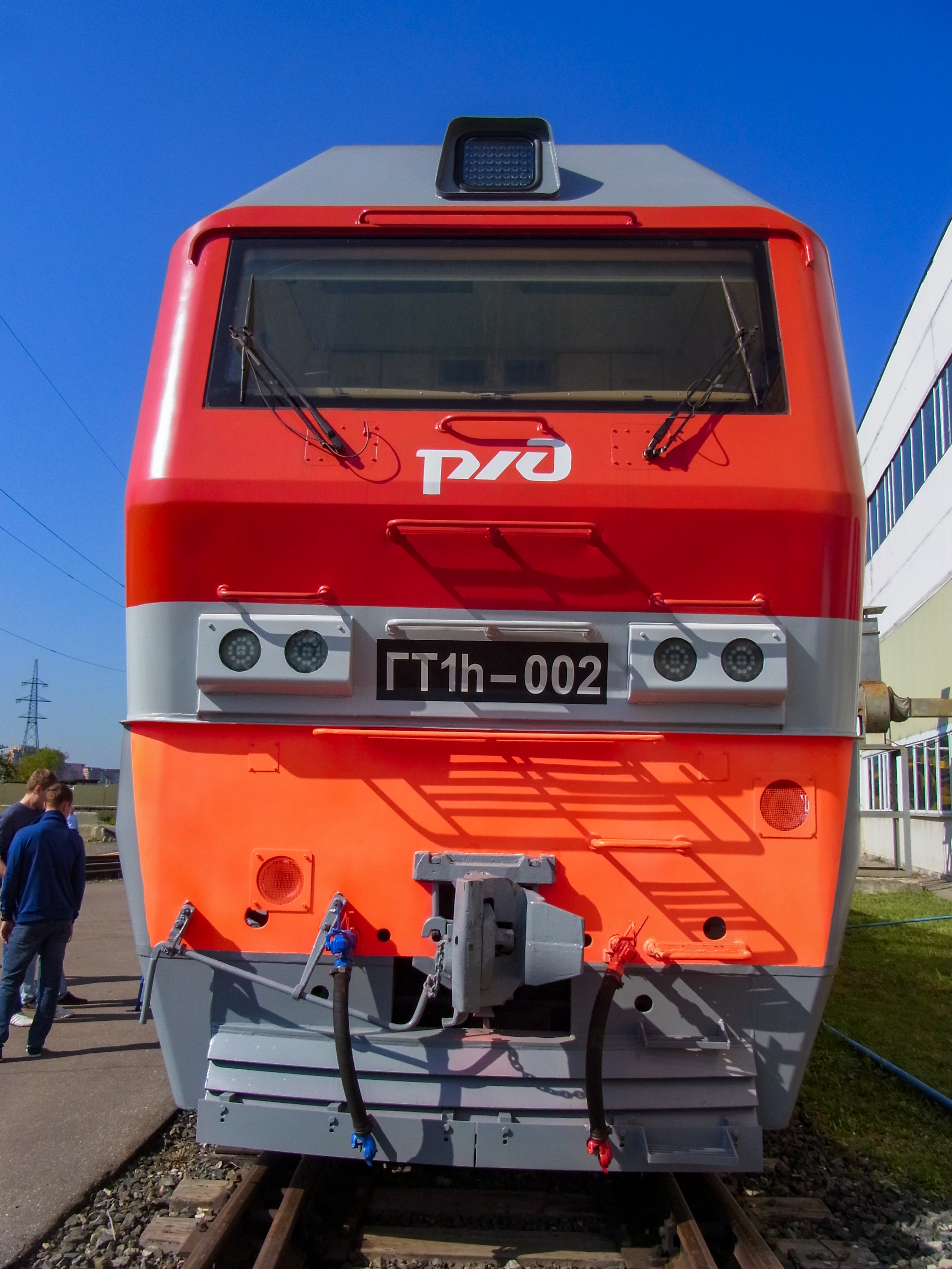 Газотурбовоз ГТ1h-002 на выставке Экспо-1520, вид спереди